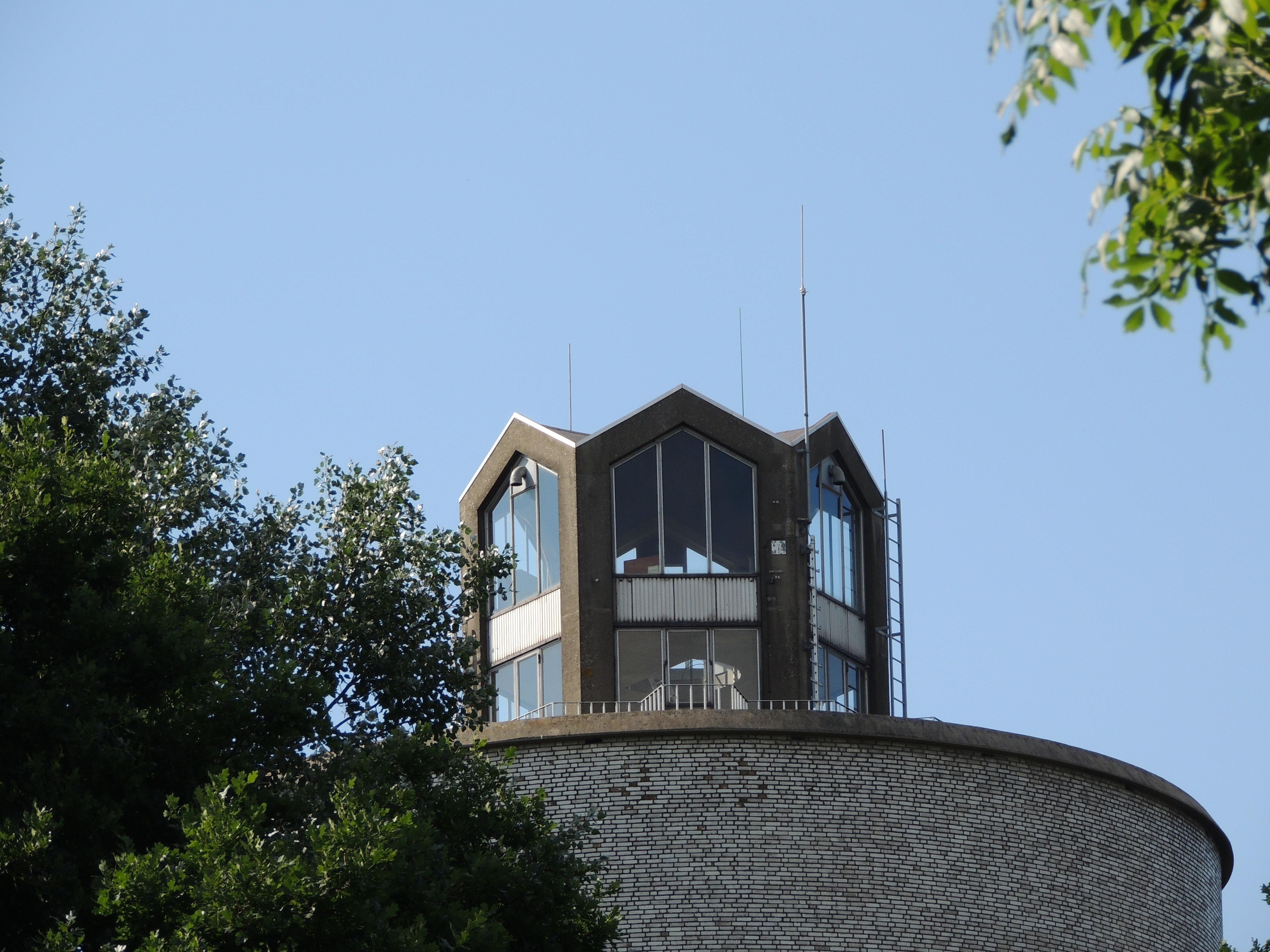 De top van de watertoren. Drachten